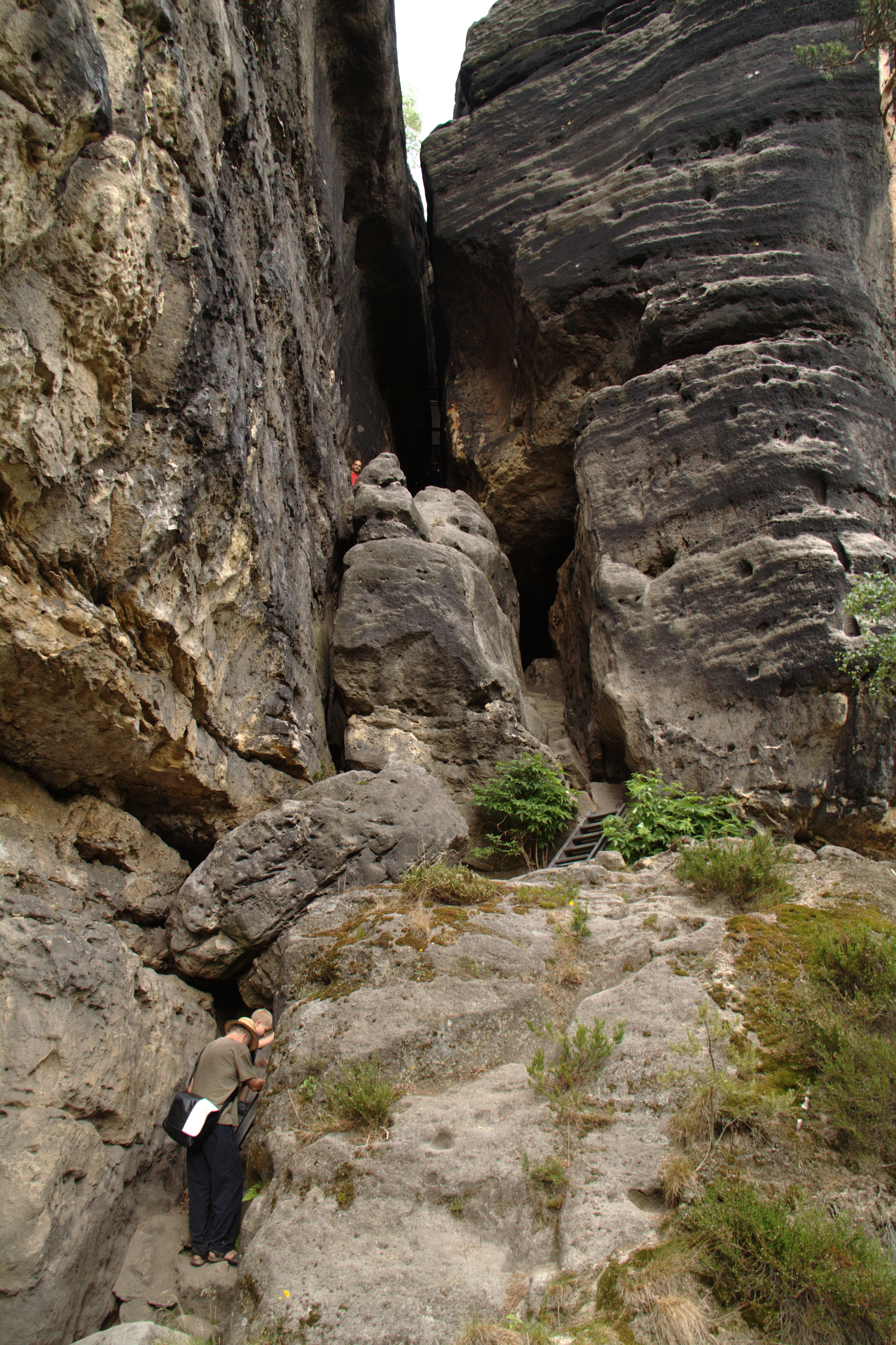 Blick von unten in den Aufstieg zur Klufthöhle am Winterstein (Sächsische Schweiz)